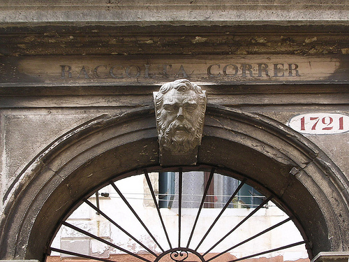 Ingresso del Museo Correr quando si trovava a Palazzo Correr a San Zan Degolà